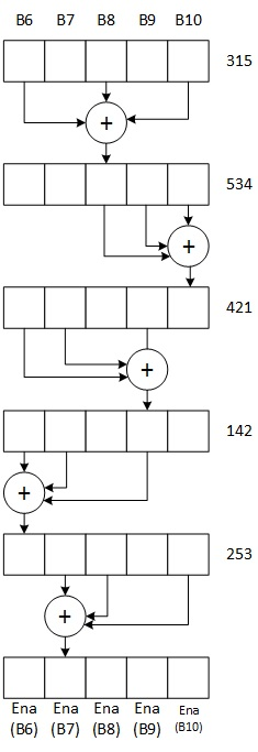 Схема обработки под-блоков с помощью таблиц анклава